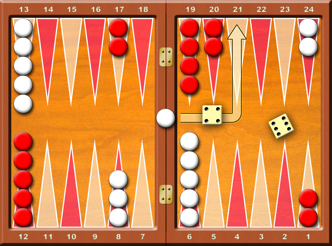 Backgammon--Dadi_6e4-Mossa obbligata per il rientro della pedina Francesco De Lorenzo (fr.dl CHIOCCIOLA tiscali.it) è l'autore di questa immagine e l'ha rilasciata sotto licenza GFDL